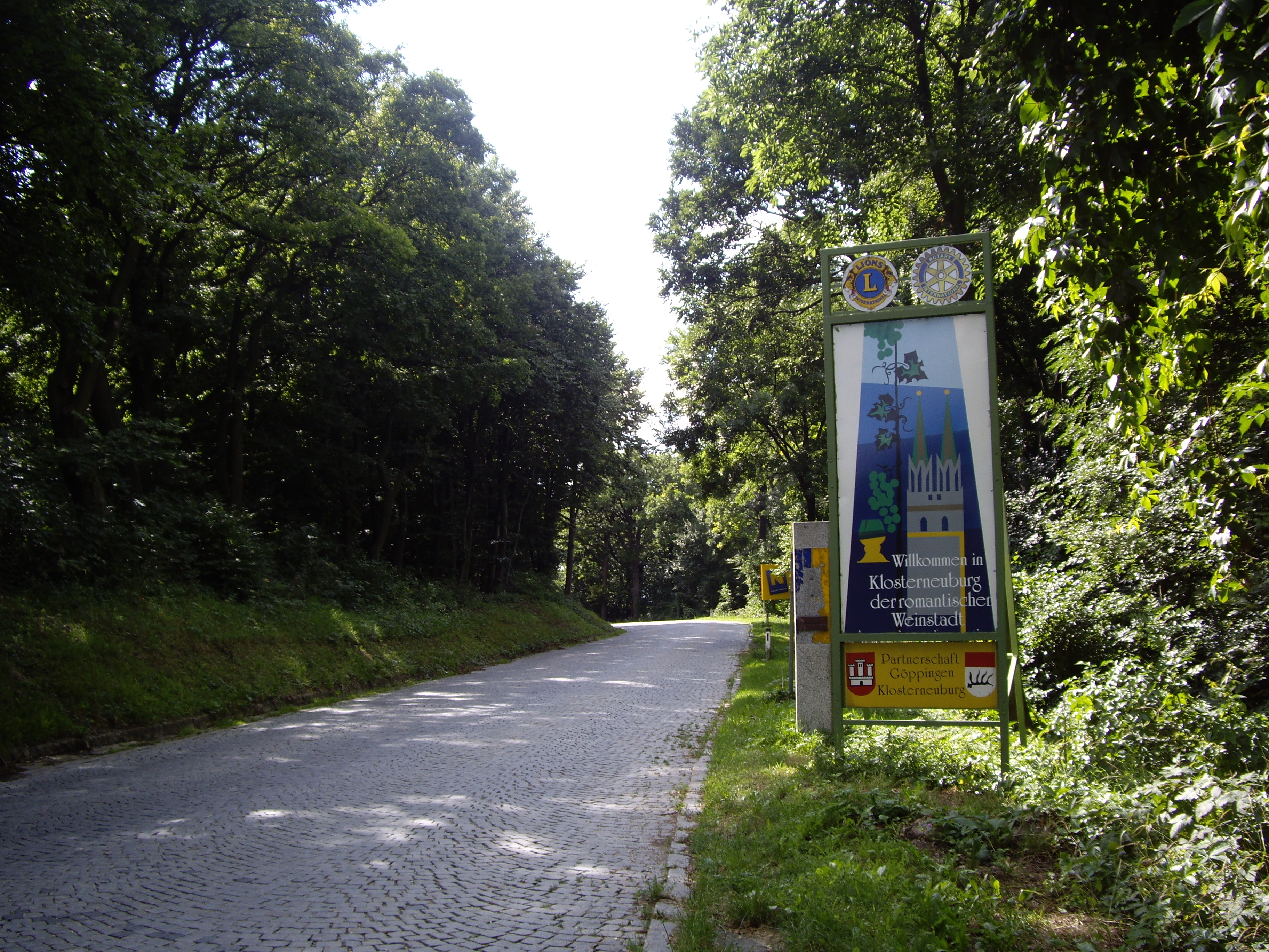 Komenciĝo de la Klostronovburga Altaĵo-ŝoseo en Vieno en la selo de la Kahlenberg kaj Leopoldomonto.